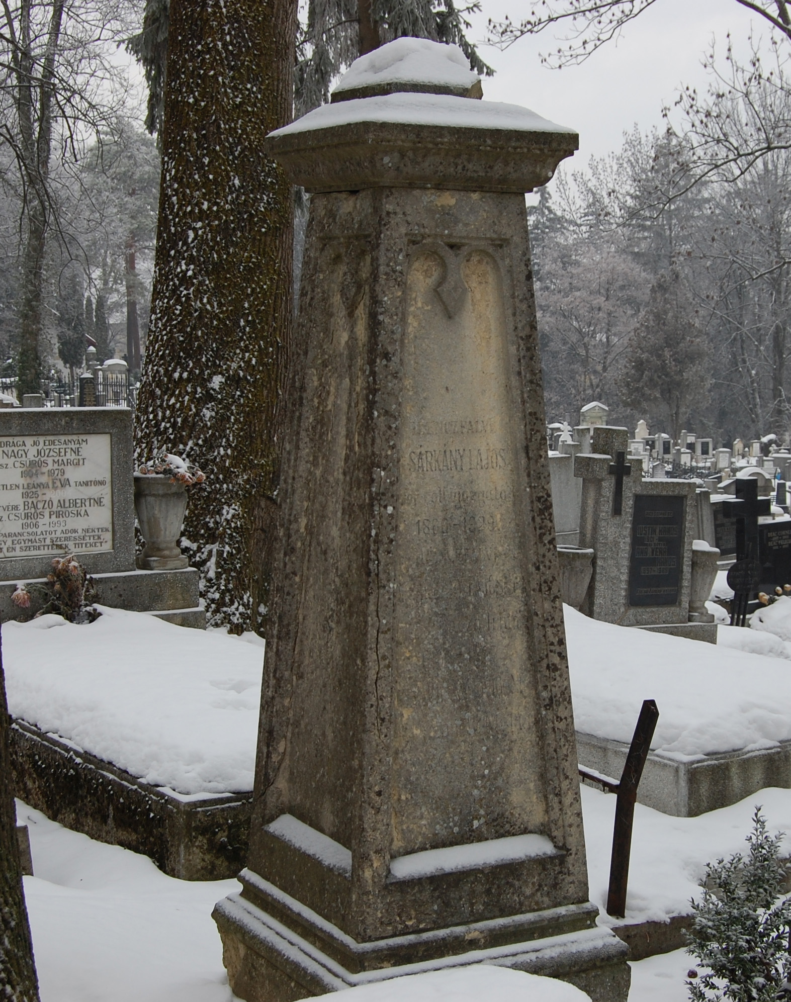 Sárkány Lajos síremléke a Házsongárdi temetőben, Kolozsvár (Kéler Ilona sírjától a Tamás Andráséhoz vezető sétányon, a Tamás András sírja után jobboldalt) 077